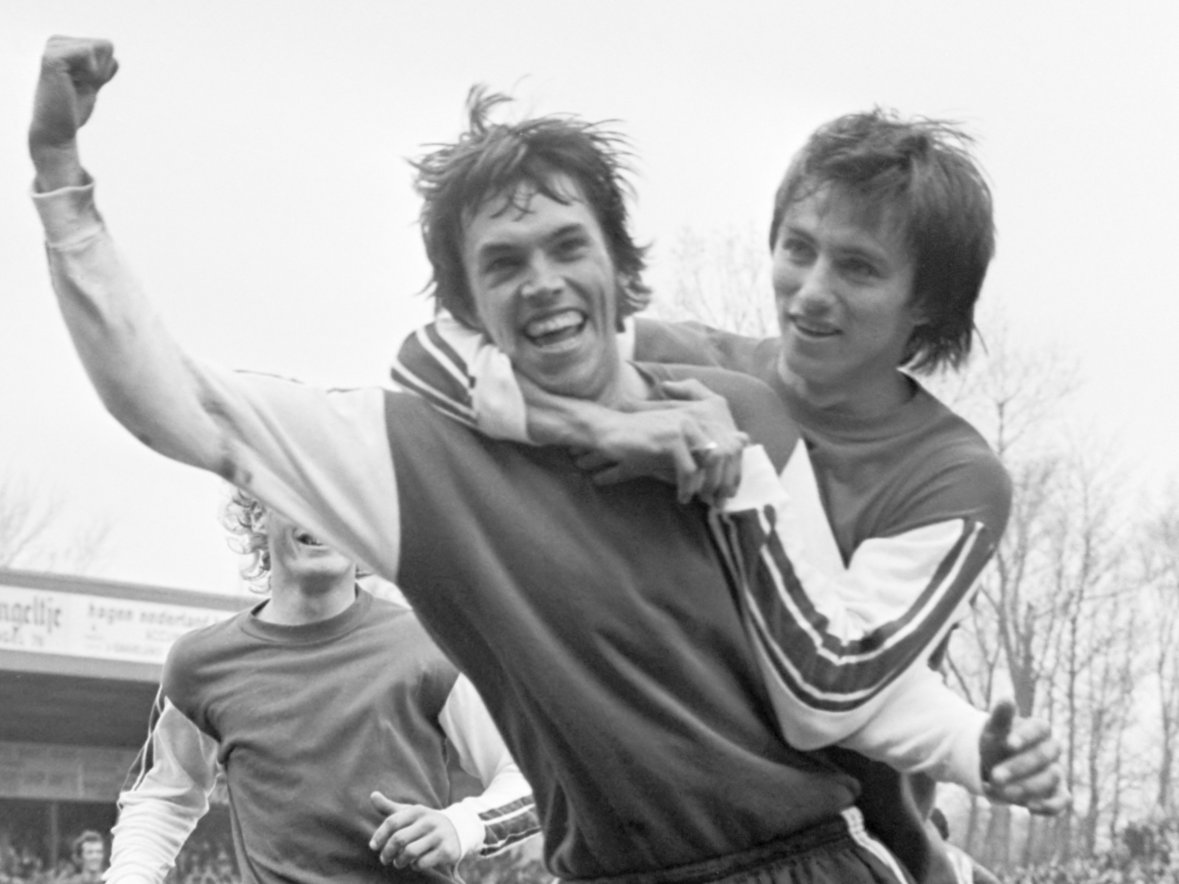 AZ-67 tegen PSV 1-0; juichende Goedhart, rechts Van Marwijk 2 mei 1976